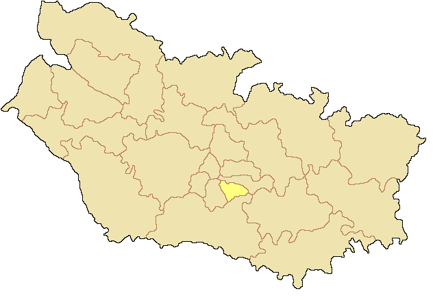 Canton d'Amiens-5 dans le département de la Somme